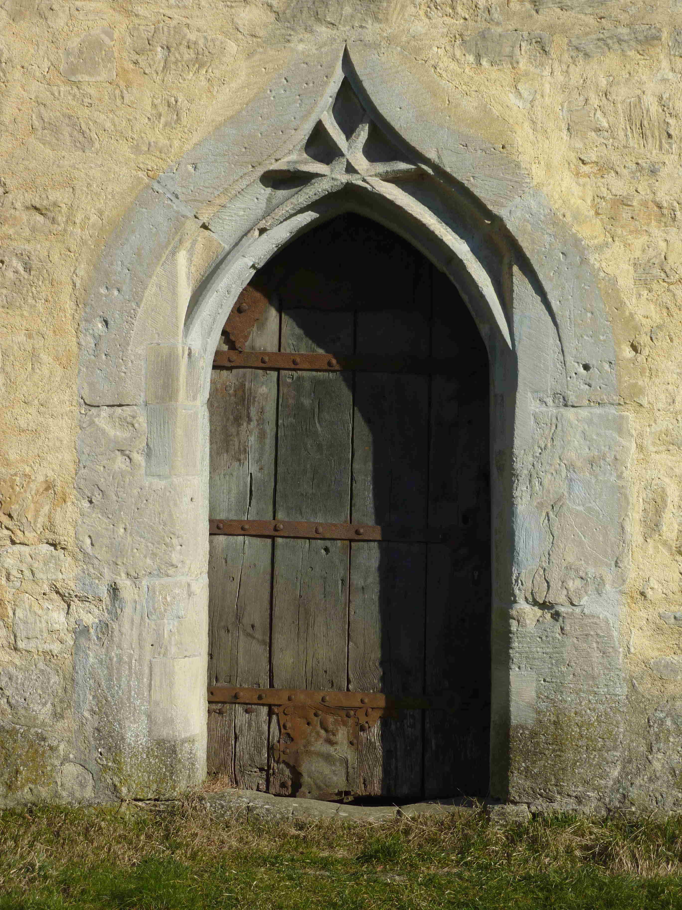 Gotisches Haus in Burgheßler (An der Poststraße) im Burgenlandkreis (Sachsen-Anhalt/Deutschland), gotische Tür